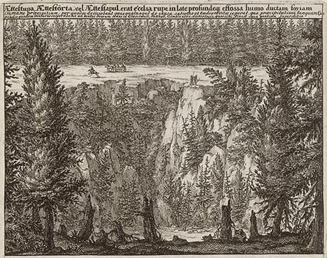 Titel i svensk övers. : Ättestupa, ättestörta eller ättestapul var ett hiskligt stup från en hög klippa ned i ett gapande djup, dit personer störtade sig ned, som av någon orsak tröttnat leva; härigenom hoppades de att fortare komma till gudarnas sälla hem i Glysisvall, Valhall, Gimle eller andra platser, som folkets blinda vidskepelse uppdiktat. Avbildar möjligen någon av ättestuporna vid något av västgötabergens diabasbranter.